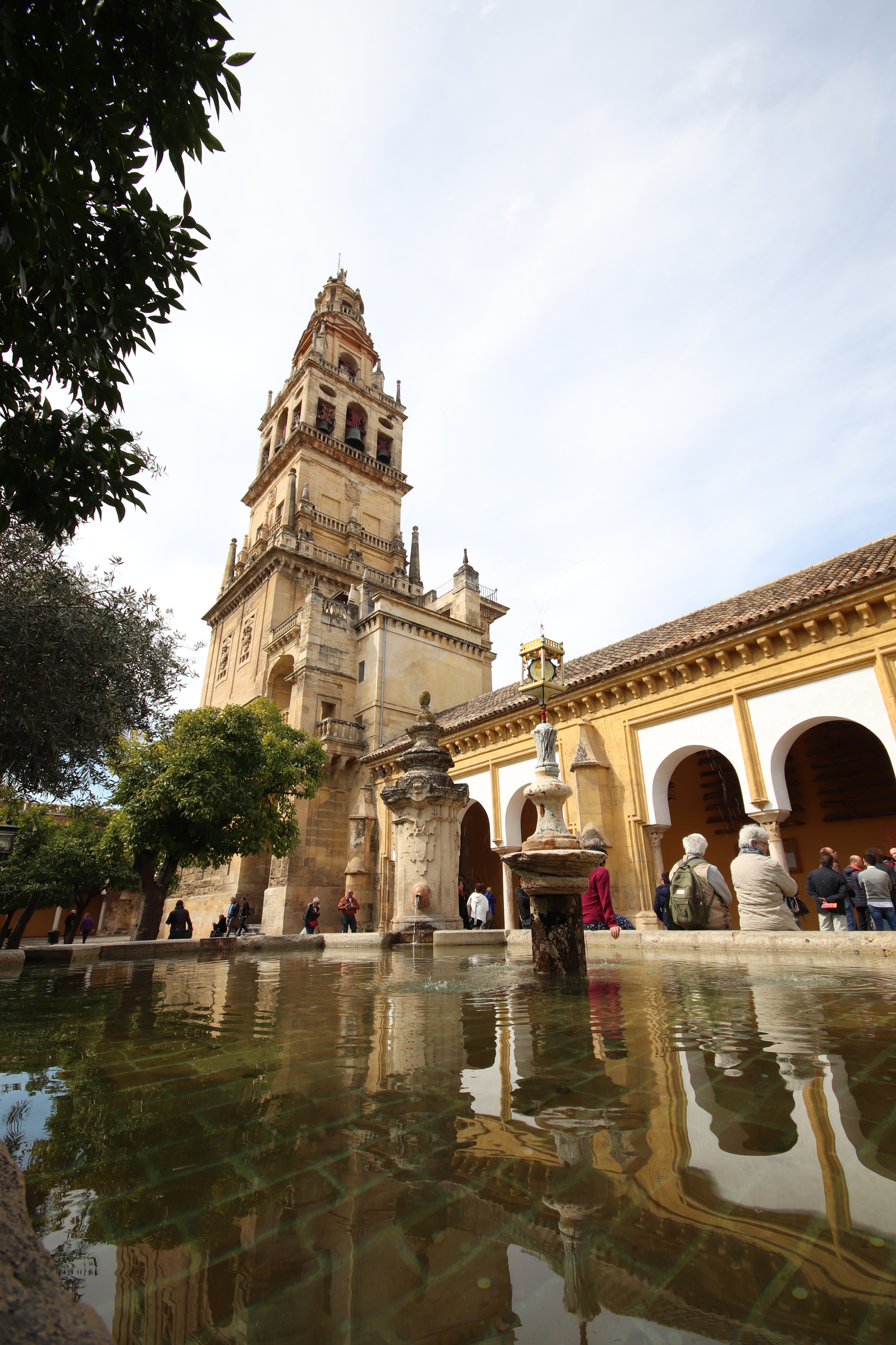 Punto de vista de la Torre del Perdón desde la Fuente de Santa María en el patio de la Mezquita de Córdoba